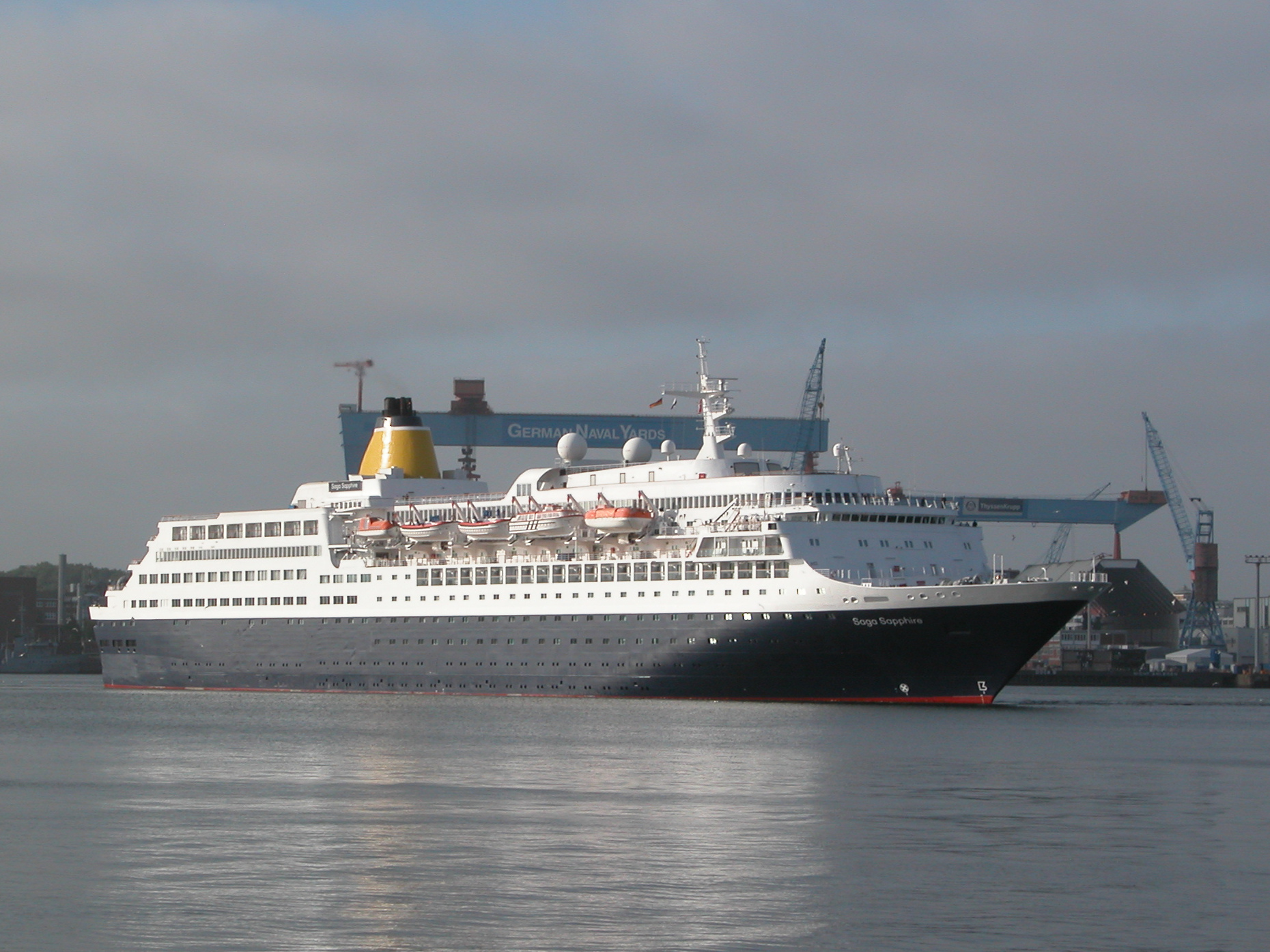 Saga Sapphire in Kiel 2018